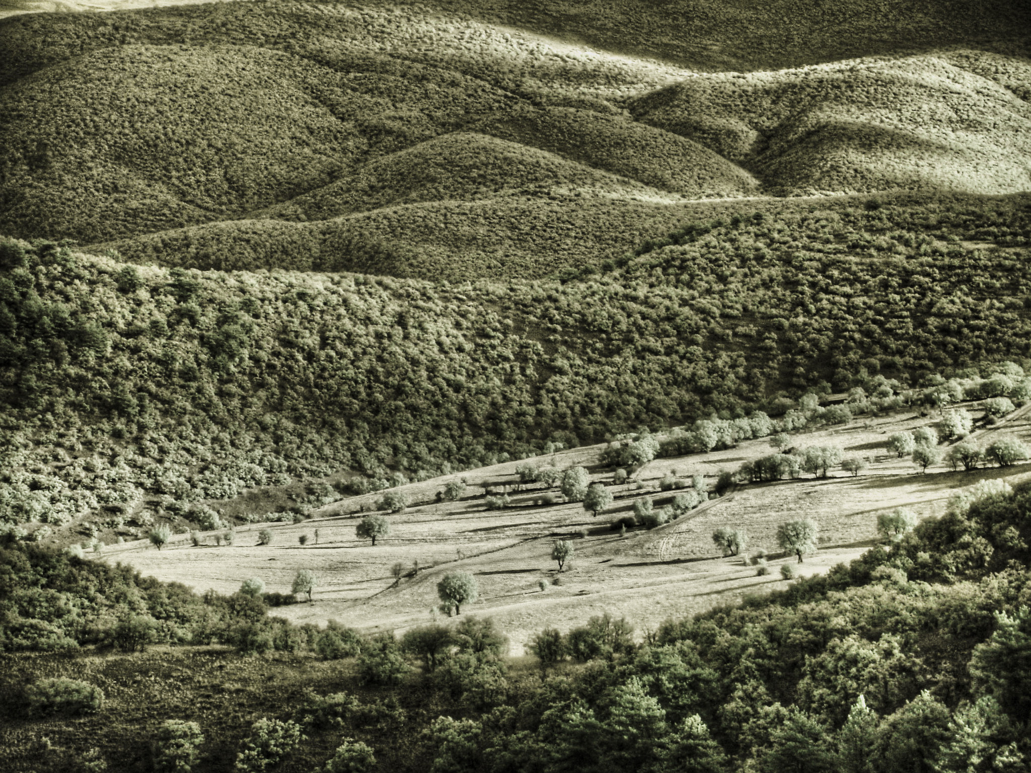 Kızılcahamam, Infrared Photographs